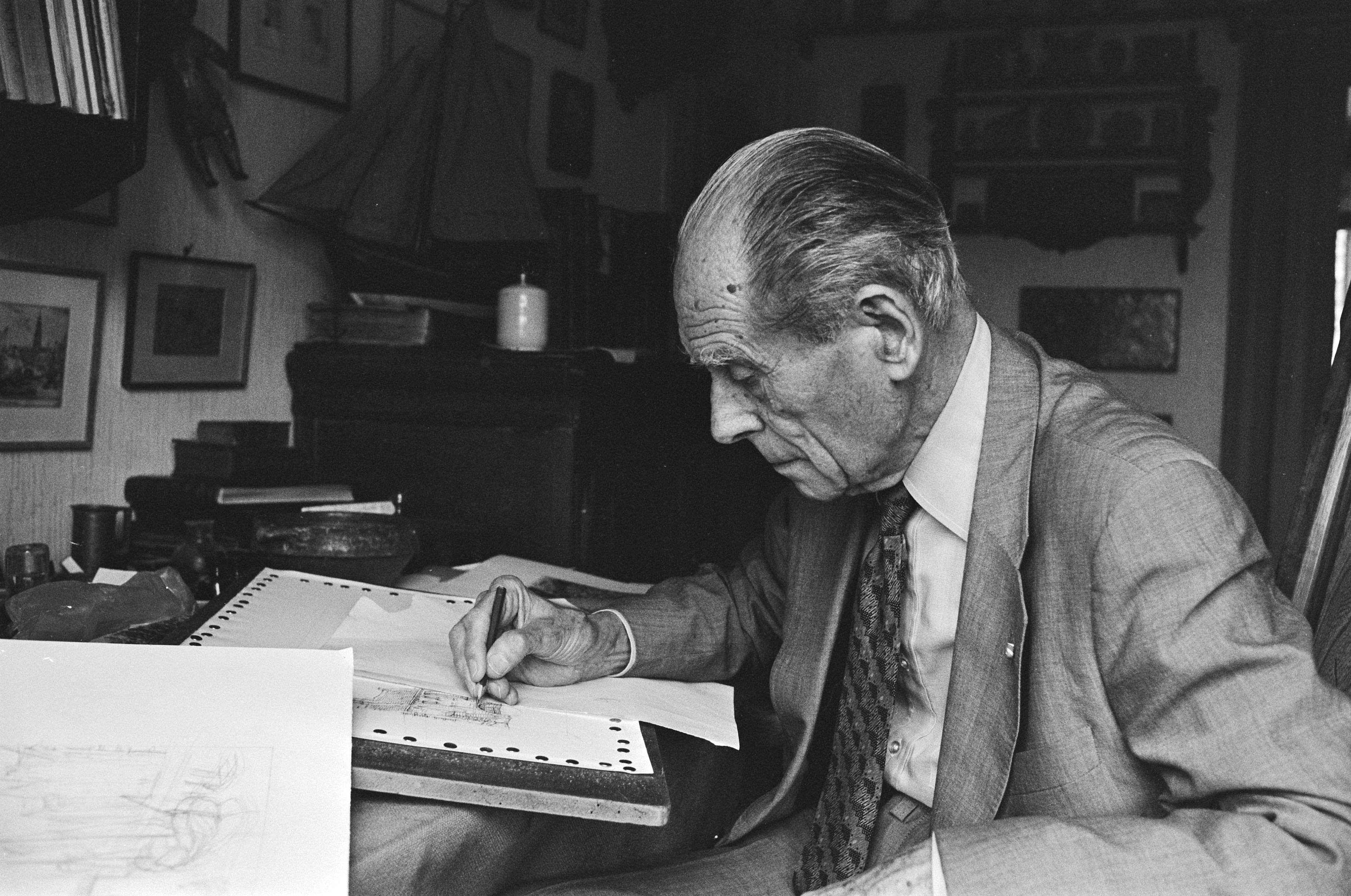 Collectie / Archief : Fotocollectie Anefo Reportage / Serie : Tekenaar Anton Pieck 85 jaar Beschrijving : Anton Pieck in zijn werkkamer Datum : 18 april 1980 Trefwoorden : portretten, tekenaars Persoonsnaam : Pieck, Anton Fotograaf : Suyk, Koen / Anefo Auteursrechthebbende : Nationaal Archief Materiaalsoort : Negatief (zwart/wit) Nummer archiefinventaris : bekijk toegang 2.24.01.05 Bestanddeelnummer : 930-7782